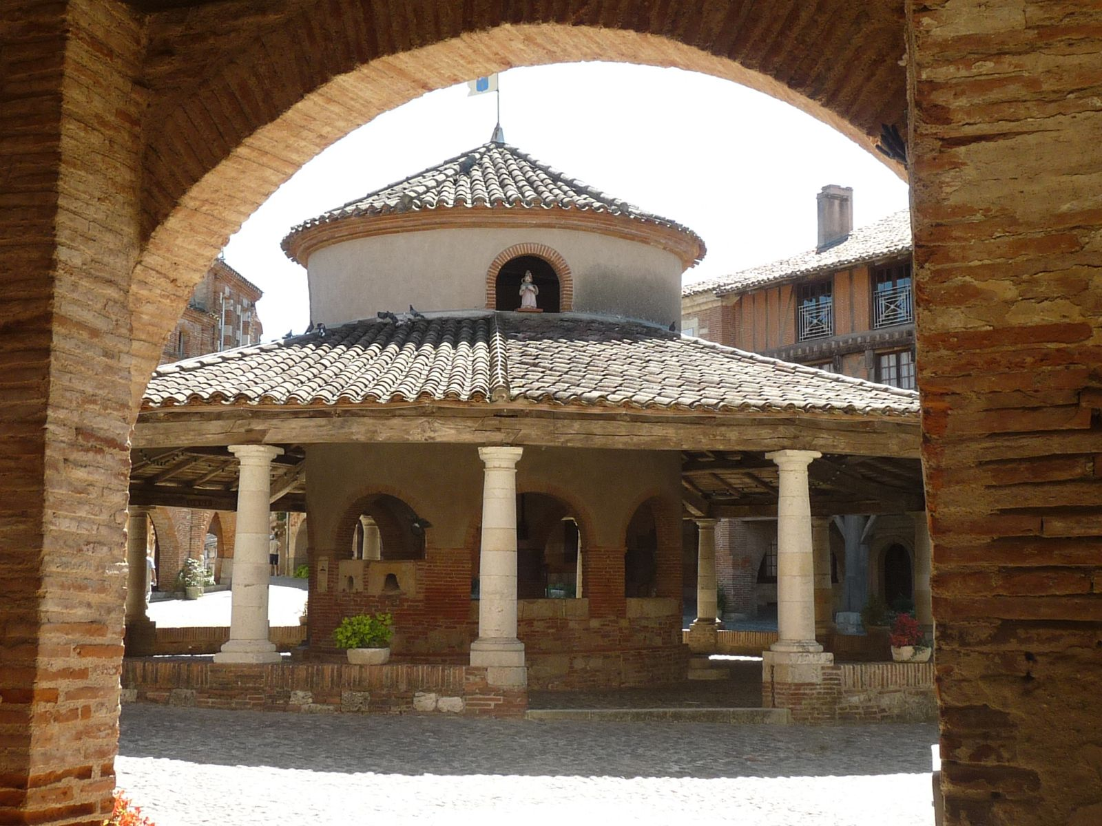 Halle aux grains à Auvillar (82), France